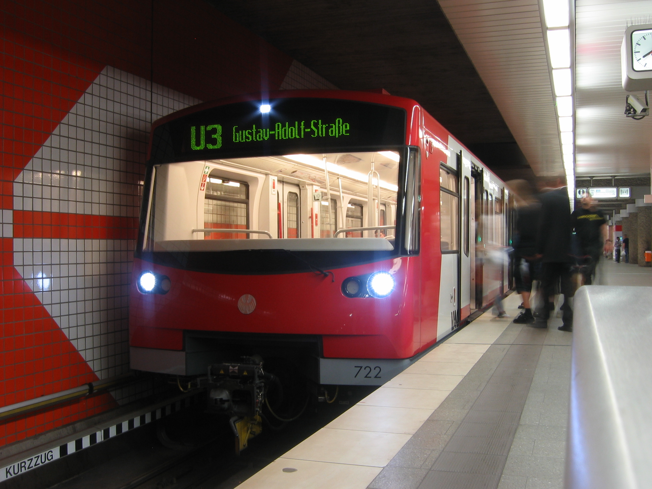 U-3 in Nürnberg